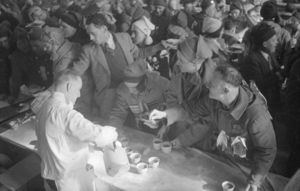 Lors d'une rencontre de clubs de raquetteurs, nous voyons une foule de raquetteurs en costume réclamant des breuvages à une cantine du Marché Saint-Jacques à l'angle des rues Amherst et Ontario Est à Montréal. Nous apercevons un serveur remplissant des tasses sur un comptoir.